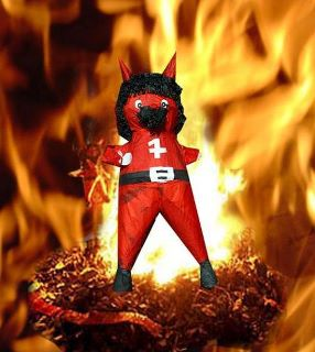 Feliz Cumpleaños Rony Zepeda